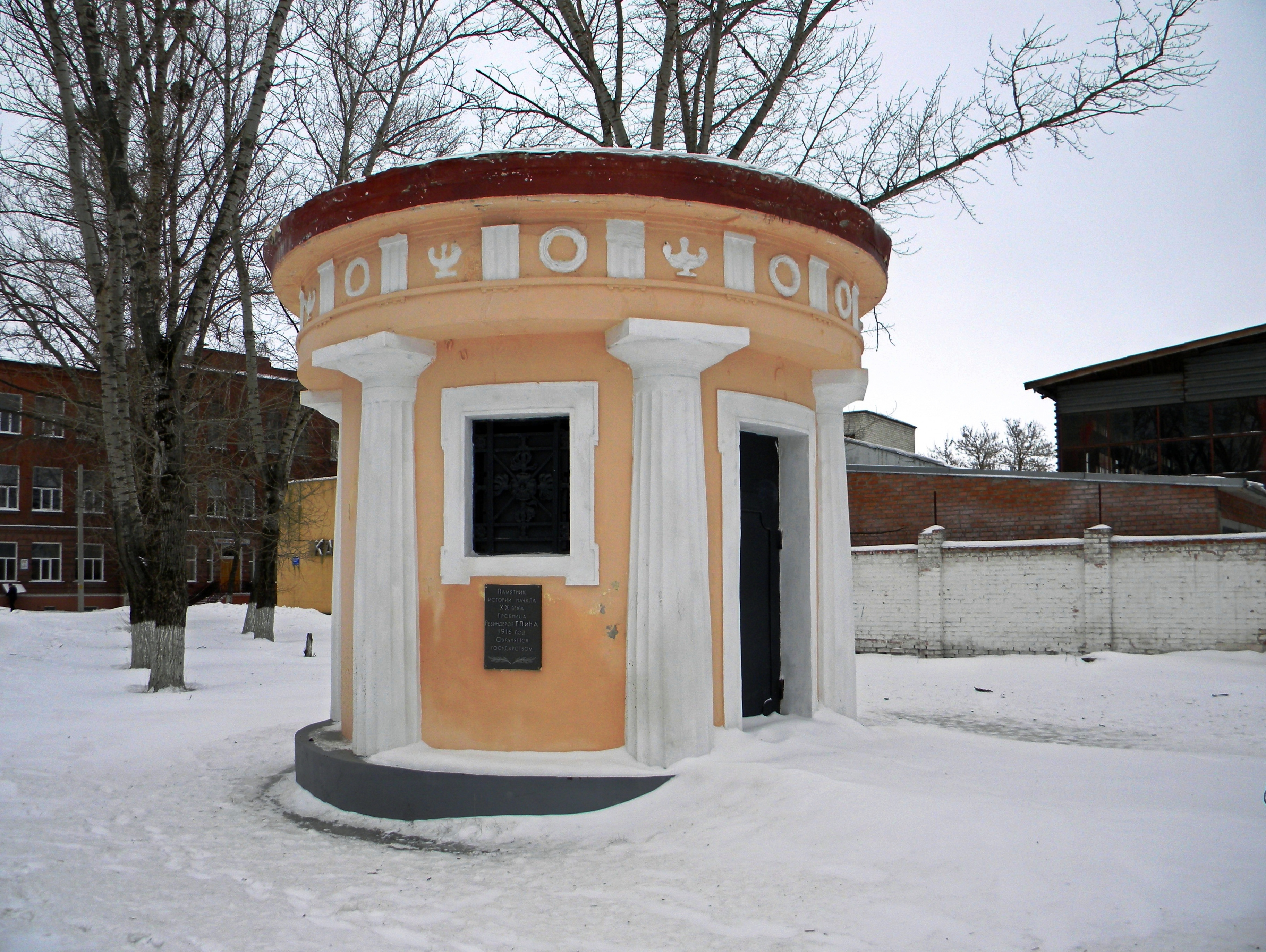 Гробница Ребиндеров в городе Шебекино